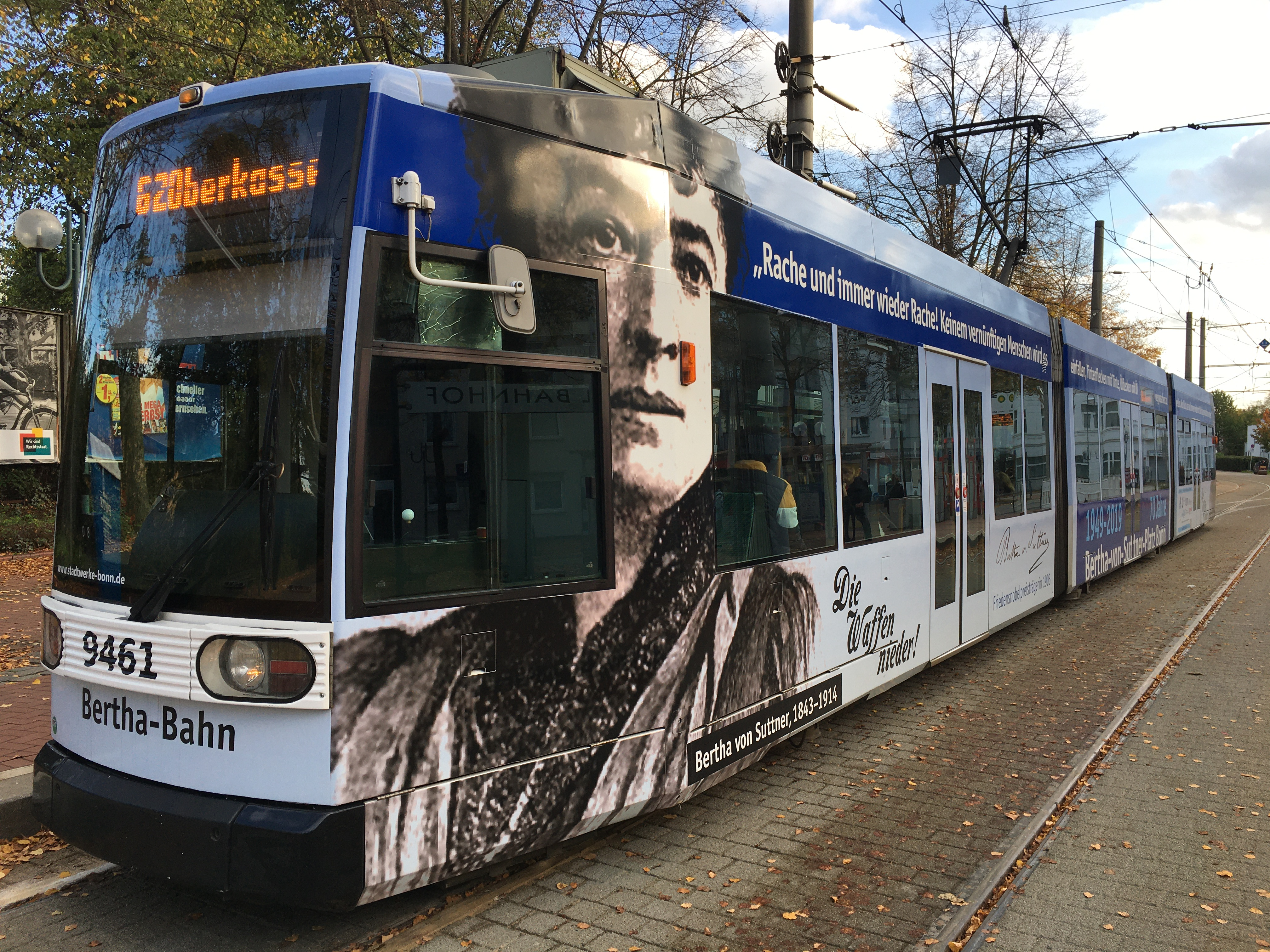 Deutschland, Bonn, Strassenbahnhaltestelle Beuel Bahnhof: die "Bertha-Bahn": ein Zug der Linie 62. Die Bahn erhielt ein Dekor, das auf das 70-jährige Jubiläum der Namensgebung des Bertha-von-Suttner-Platzes in Bonn aufmerksam macht. Sie fährt seit dem 21. September 2019 für die Dauer eines Jahres auf der Linie 62 von Bonn-Dottendorf nach Bonn-Oberkassel und zurück. Dieses spendenfinanzierte Projekt wird vom "Frauennetzwerk für Frieden" und vom "Netzwerk Friedenskooperative" durchgeführt.